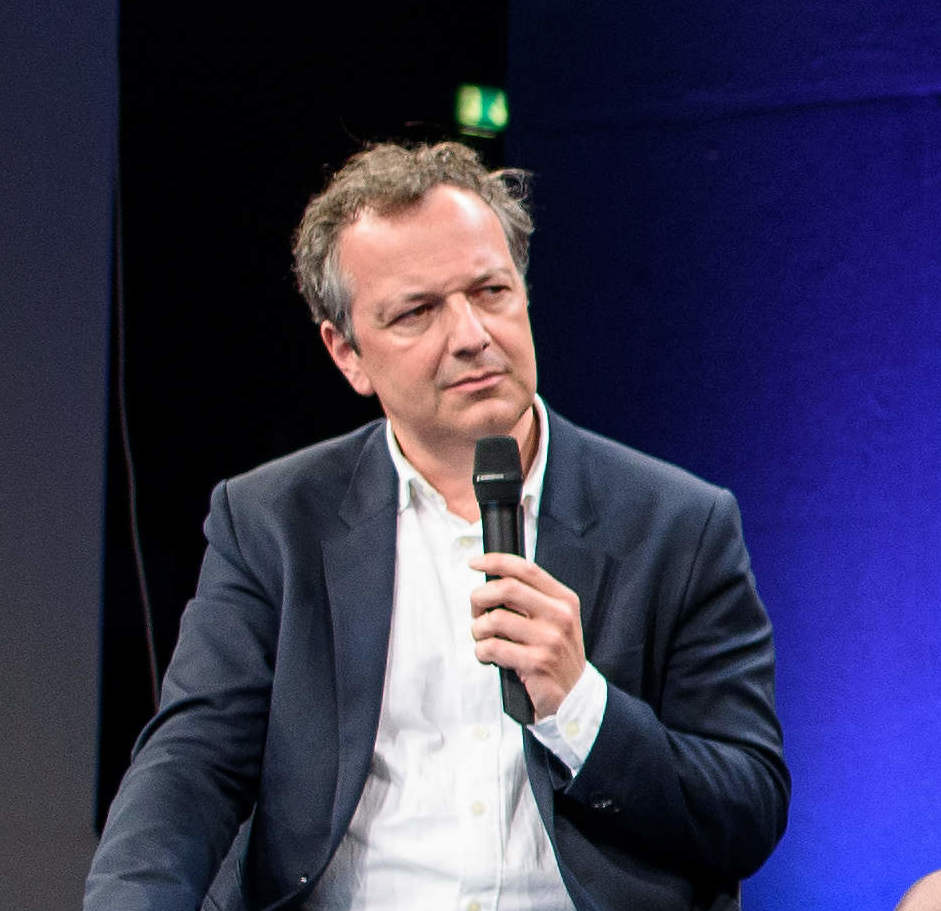 04.05.2018, Berlin: Talk: #Digitalcharta continued - Wir präsentieren die überarbeitete Fassung 2018 Speaker: Daniel Opper, Jeanette Hofmann, Götz Hamann, Johnny Haeusler, Malte Spitz Die re:publica ist eine der weltweit wichtigsten Konferenzen zu den Themen der digitalen Gesellschaft und findet in diesem Jahr vom 02. bis 04. Mai in der STATION-Berlin statt. Foto: Gregor Fischer/re:publica